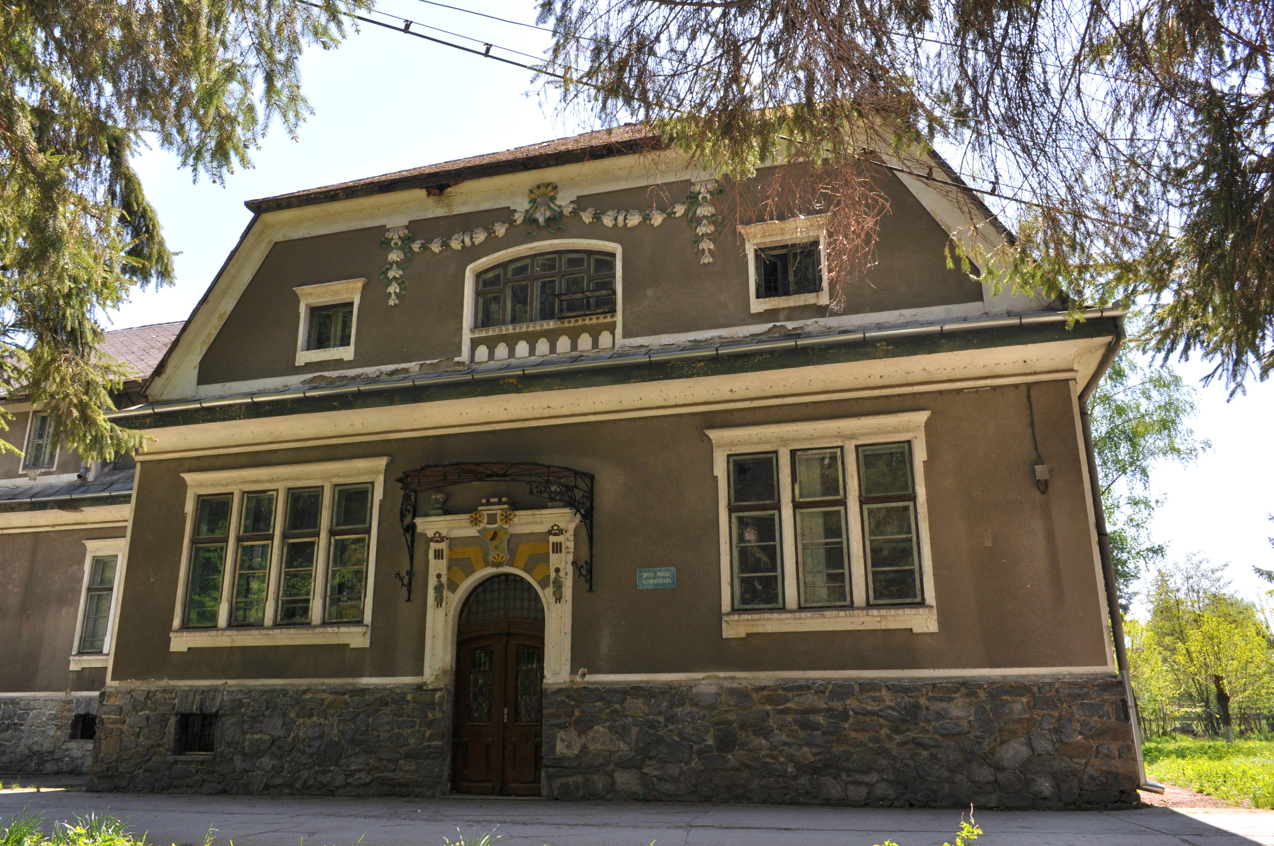 Castelul Pogany din satul PĂCLIŞA; comuna TOTEŞTI 01